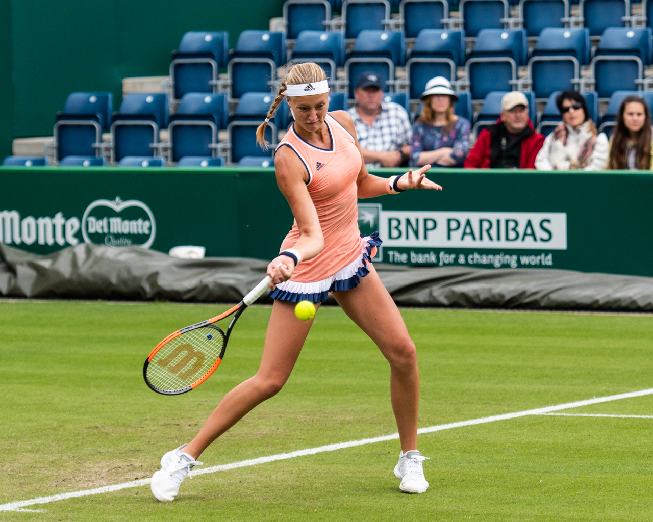 Kiki Mladenovic